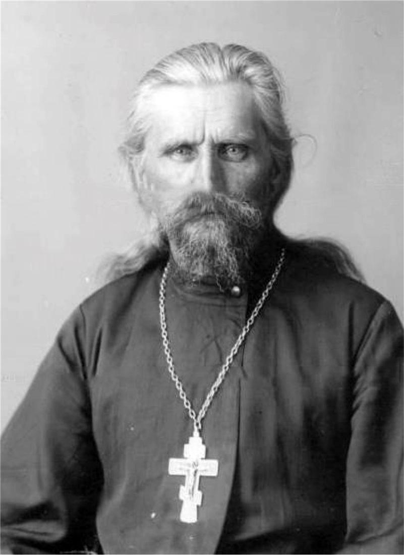 Иоанн Иоаннович Богомолов (13 ноября 1860, Пермская губерния — после 1917) — священник-миссионер, депутат IV Государственной Думы от Пермской губернии (1912—1917).